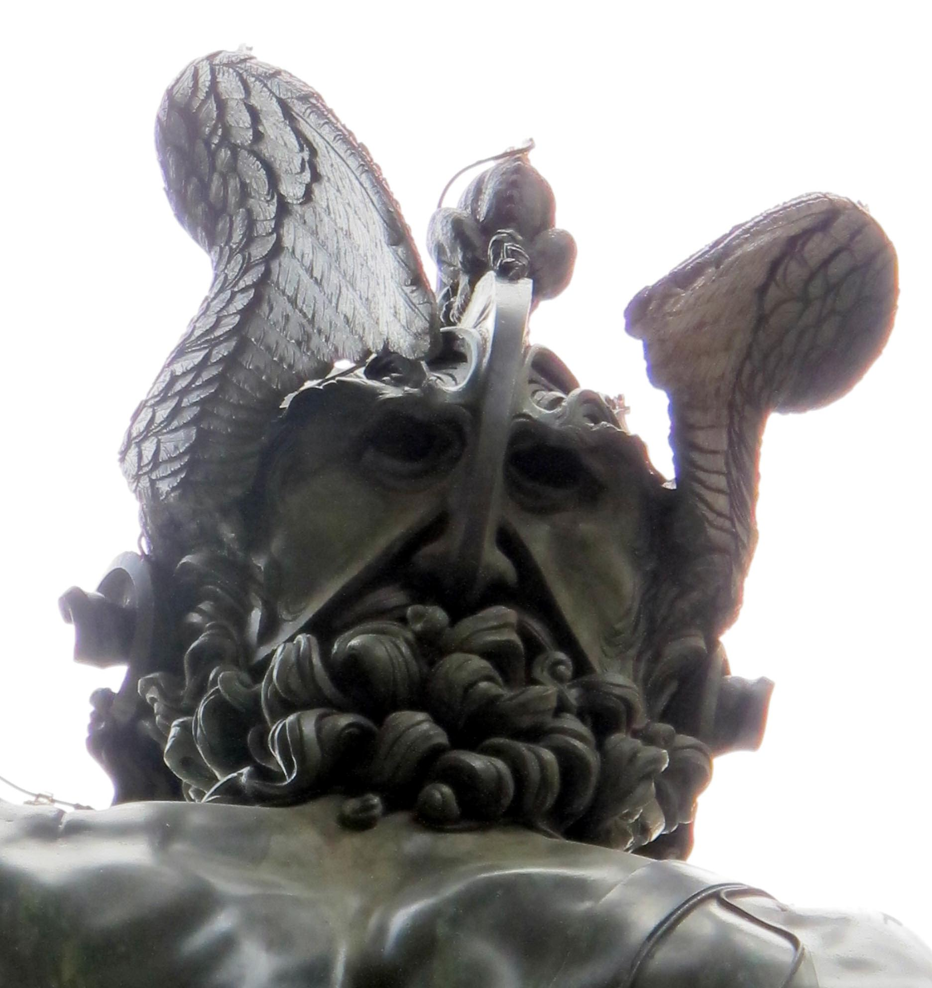 Cellini, perseo 10 autoritratto